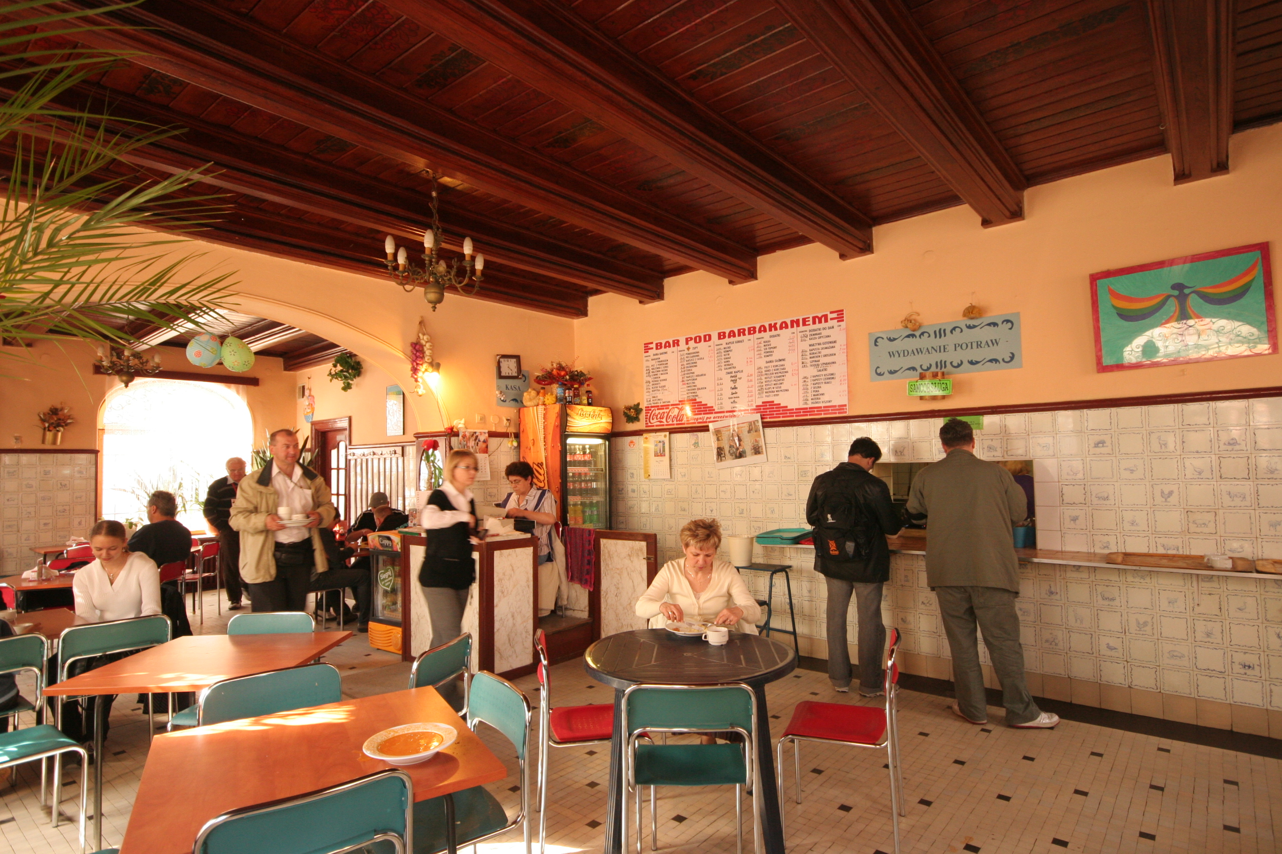 Milk Bar, restaurante típico da era comunista, na Nowe Miasto